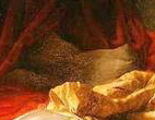 Détail 3 du verrou de Fragonard